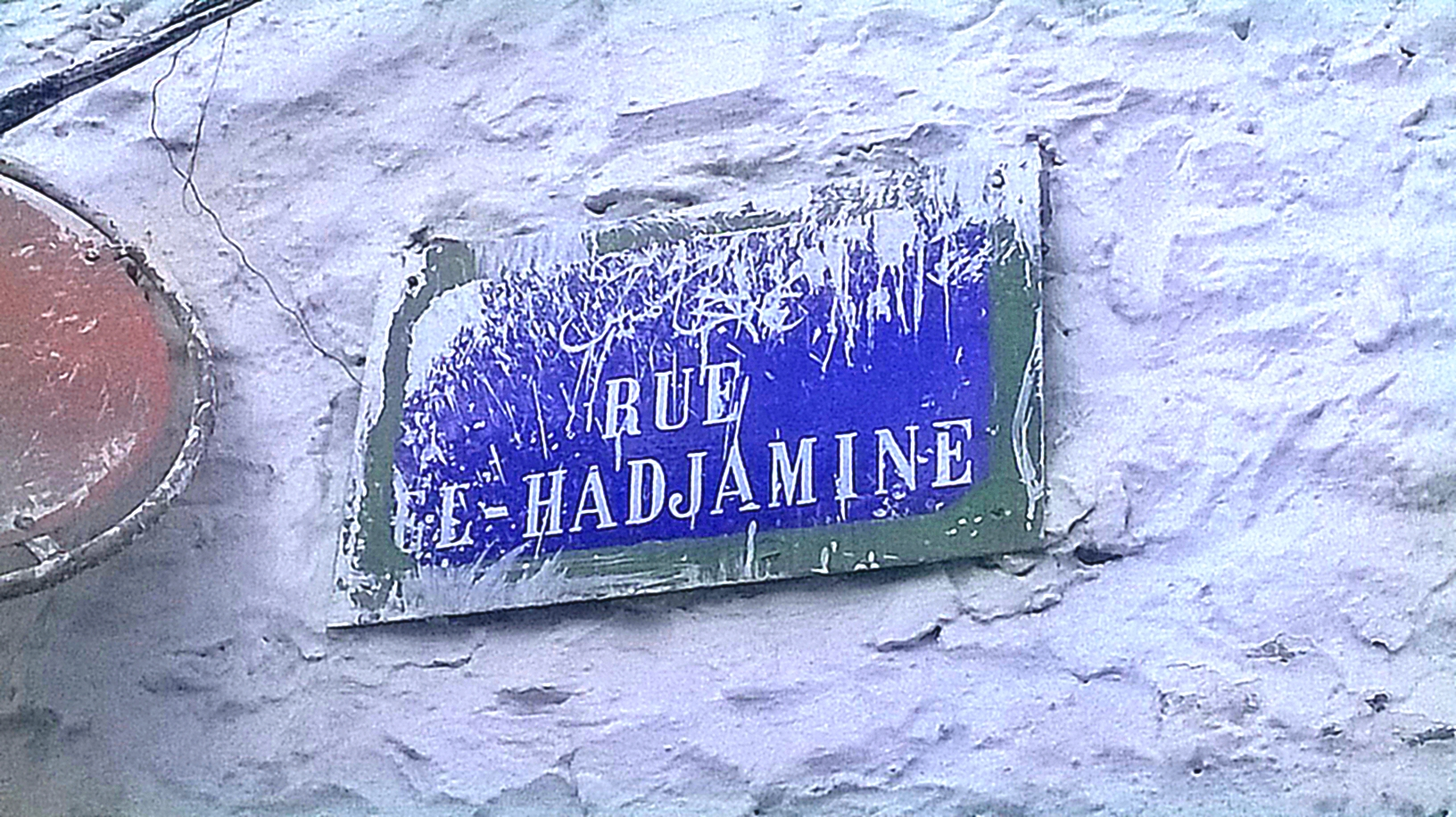 Sidi El Béchir , Tunis سيدي البشير ، تونس